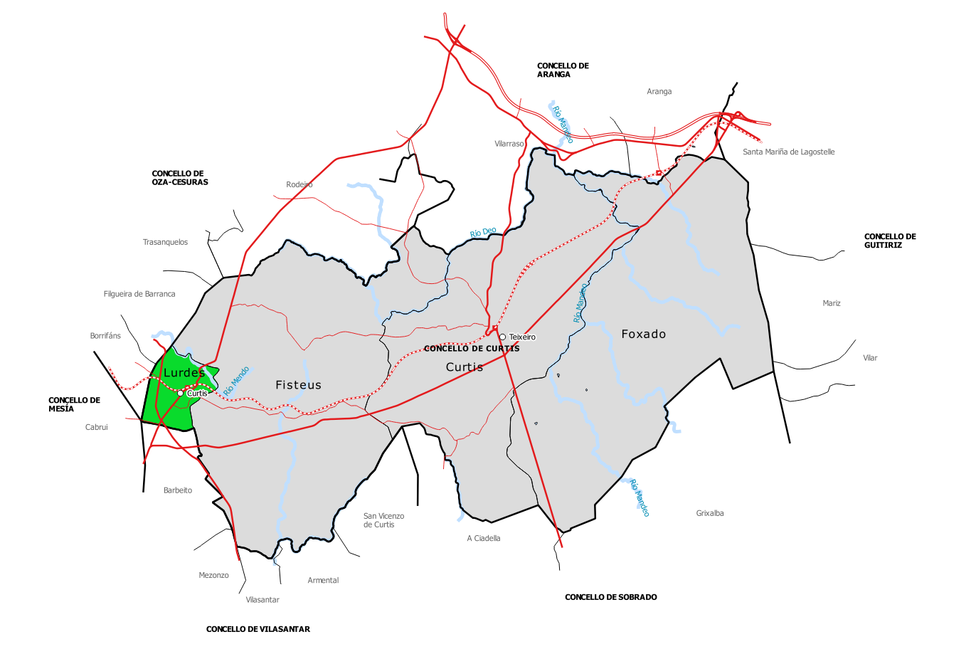 Mapa da parroquia de Lurdes [Curtis] no concello de Curtis (Galiza).